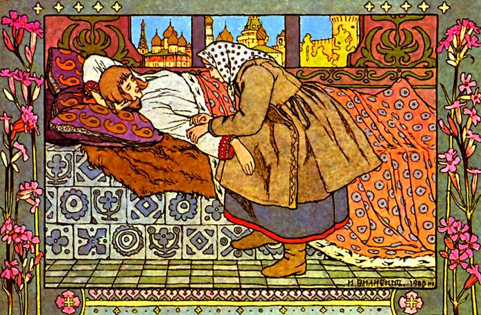 Иллюстрация к сказке «Перышко Финиста Ясного Сокола»